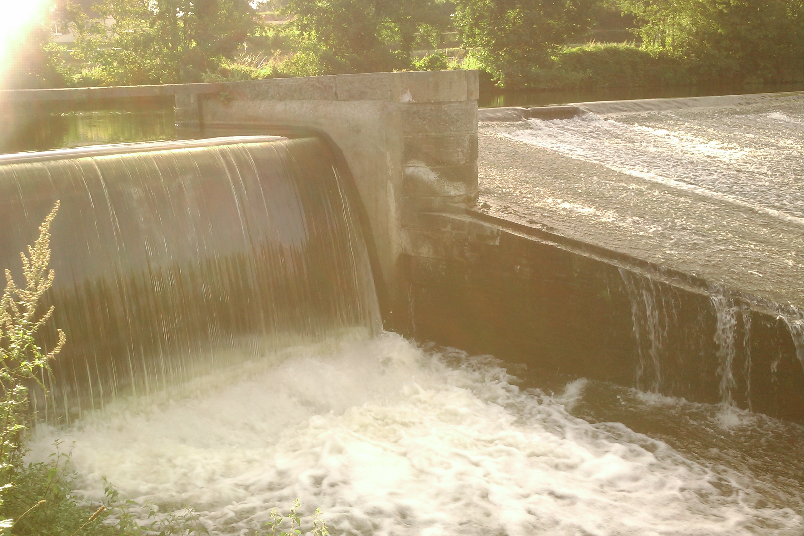 les Claies de Vire, situé sur la commune de La Meauffe